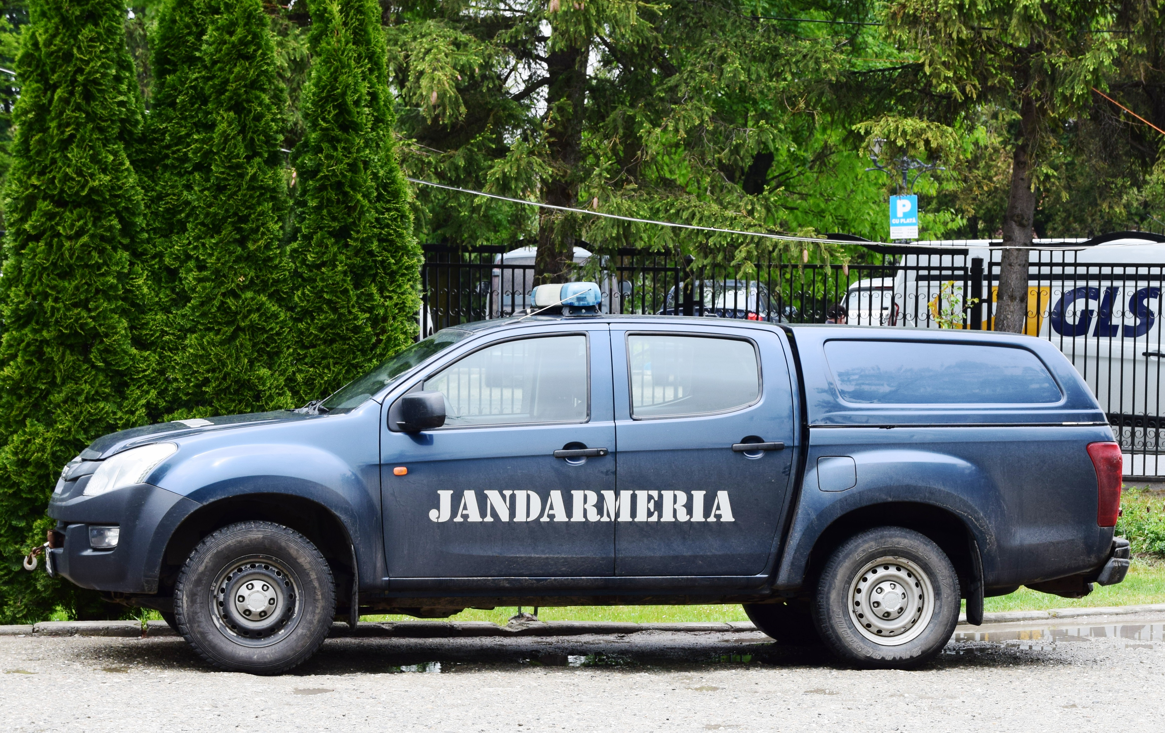 Militaire politie auto van Roemenië